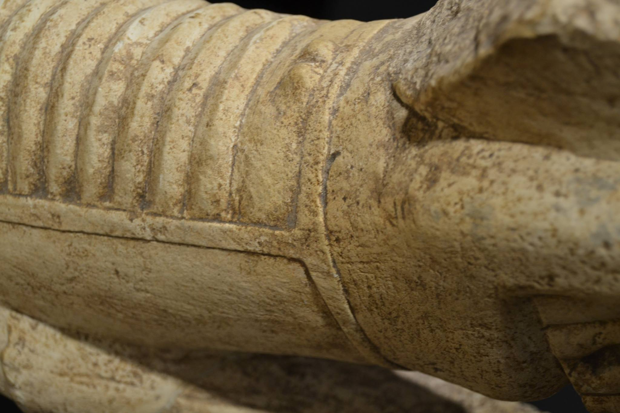 dettaglio braccio N. 5 con segni di scalpello e raschietto